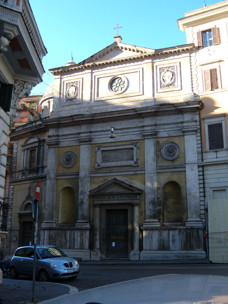 Chiesa di San Silvestro al Quirinale, a Roma, nel rione Trevi.